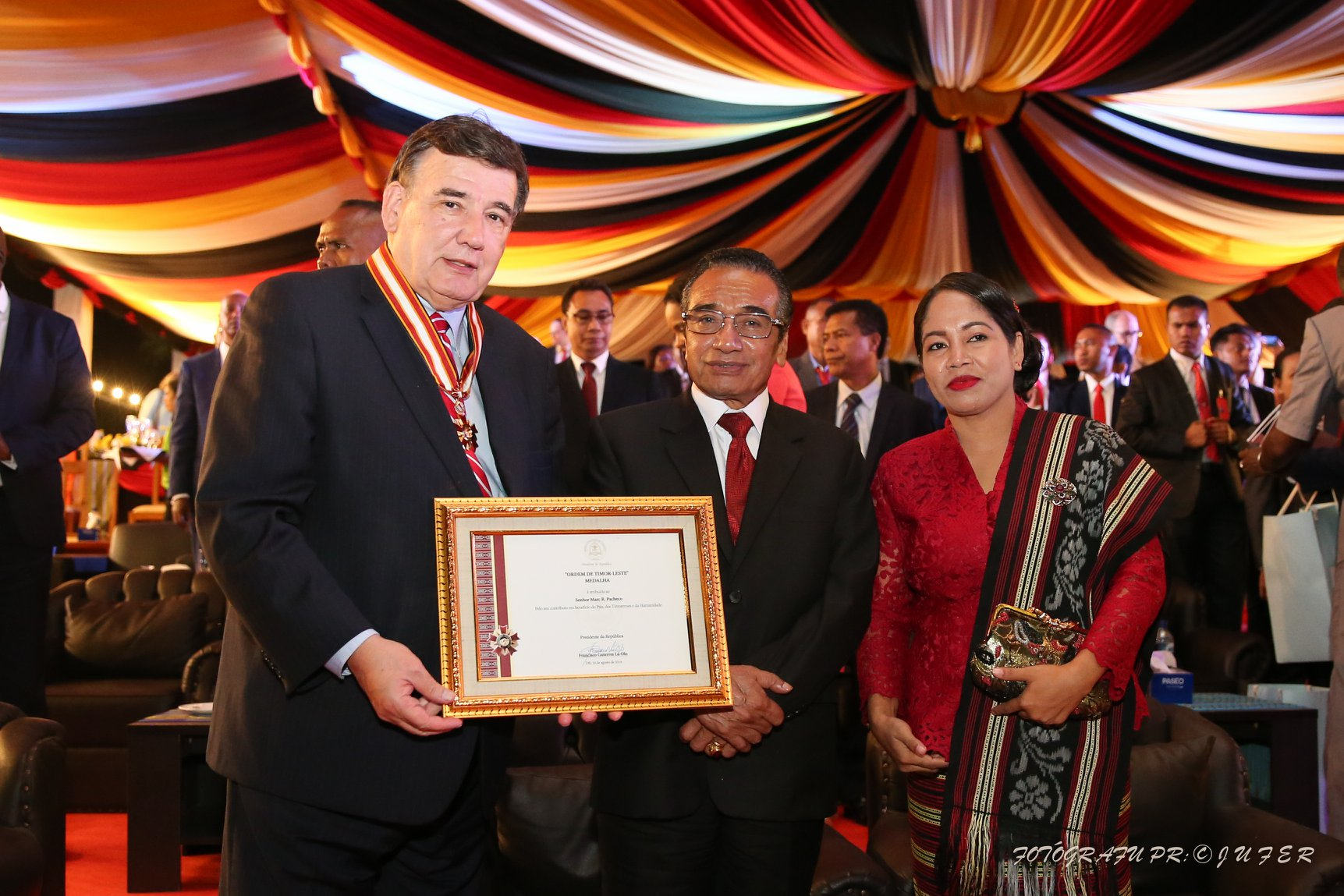 Marc R. Pacheco bekommt den Ordem de Timor-Leste von Francisco Guterres bei den Feierlichkeiten zum zwanzigsten Jubiläum des Unabhängigkeitsreferendums. Rechts: Cidália Lopes Nobre Mouzinho Guterres.